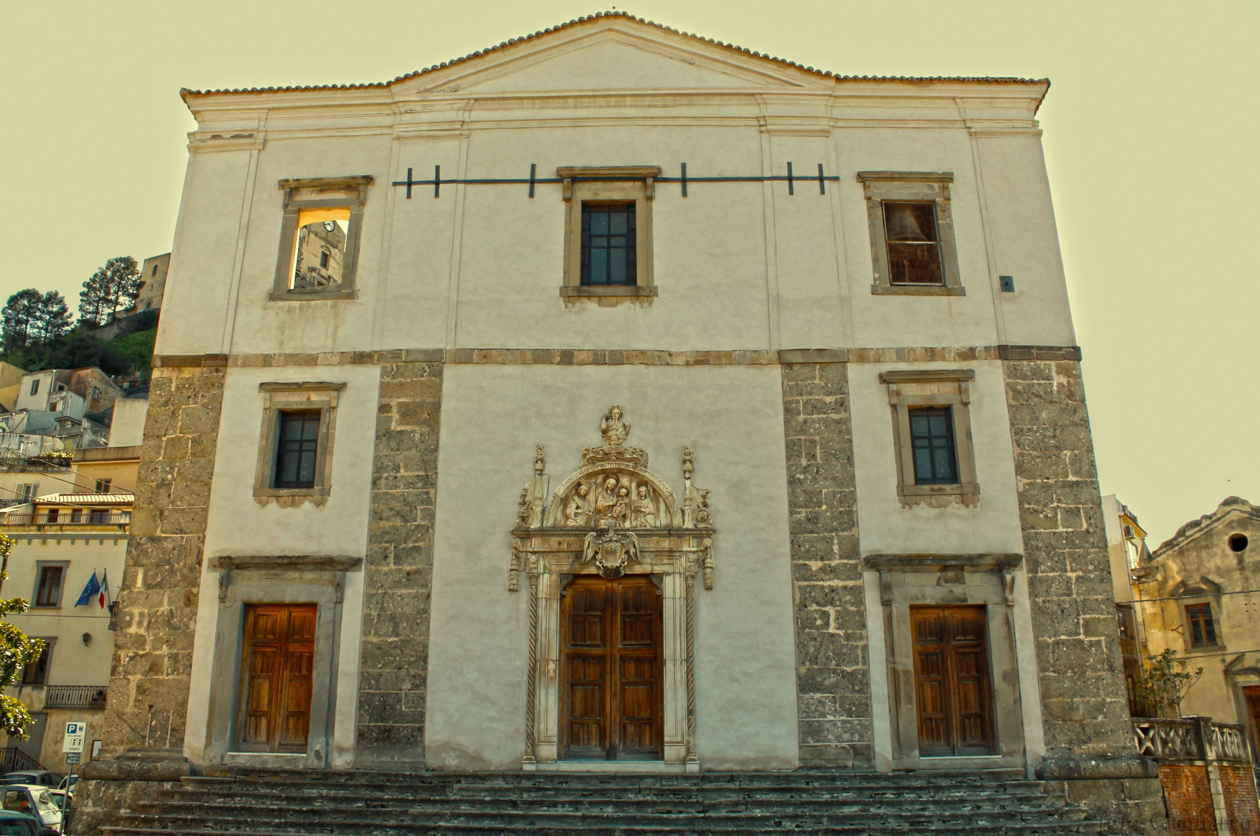 Facciata Basilica Cattedrale Santa Maria Assunta , Santa Lucia del Mela